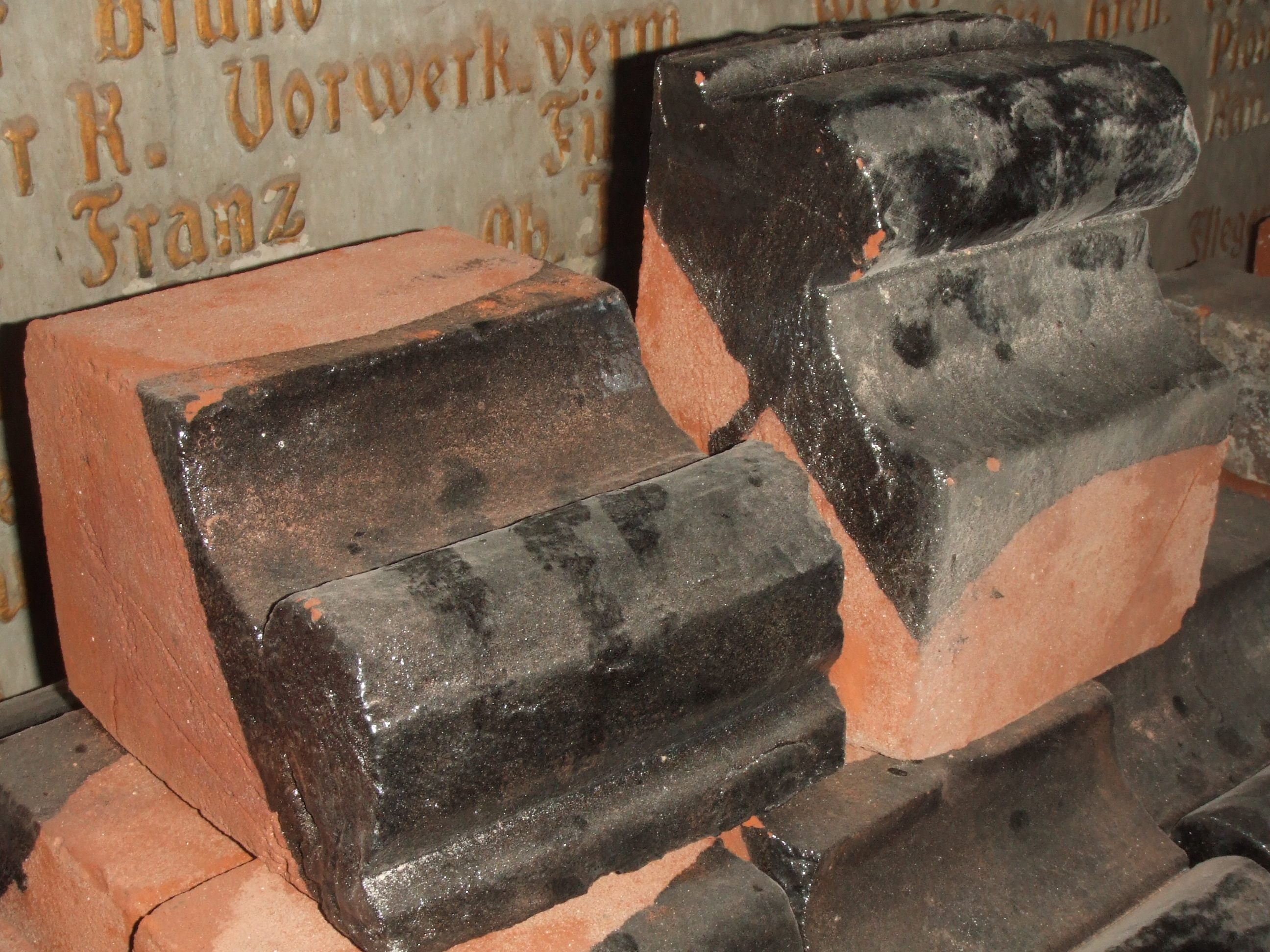 schwarz glasierter Formstein, Demmin